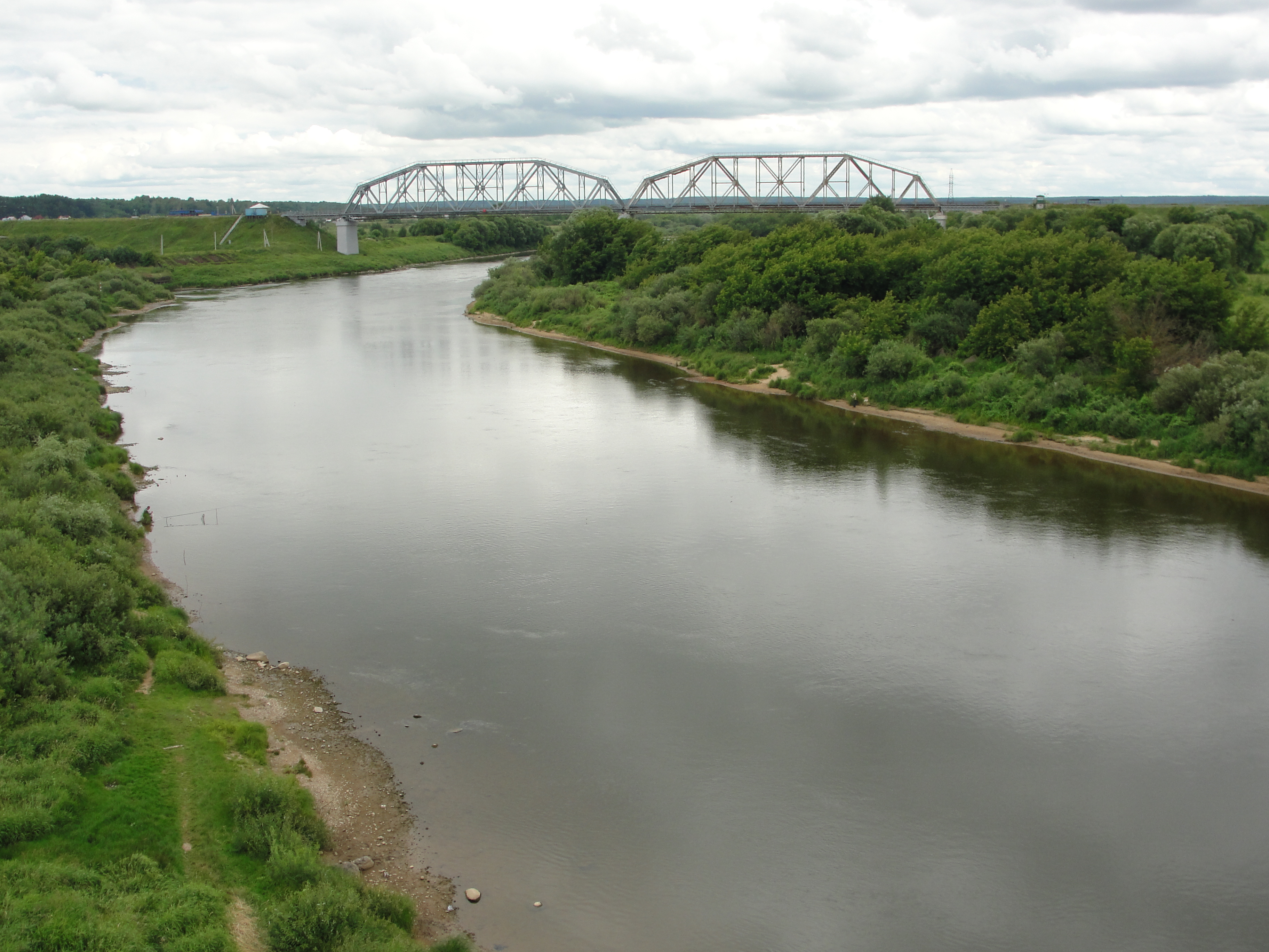 Днепр, ж/д мост